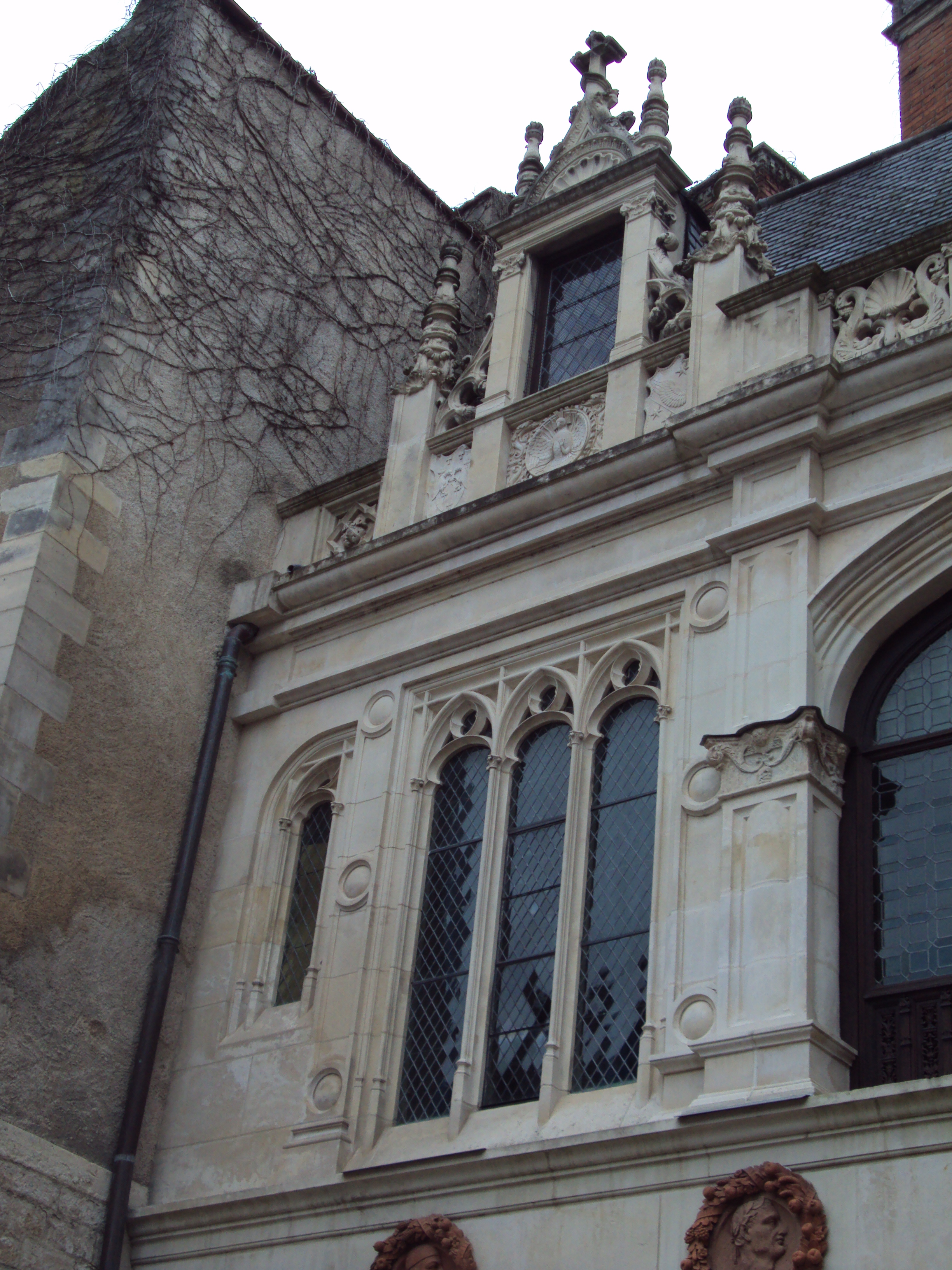 Hotel d'Alluye